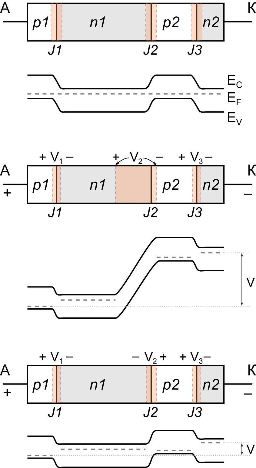 Тиристор при прямом смещении